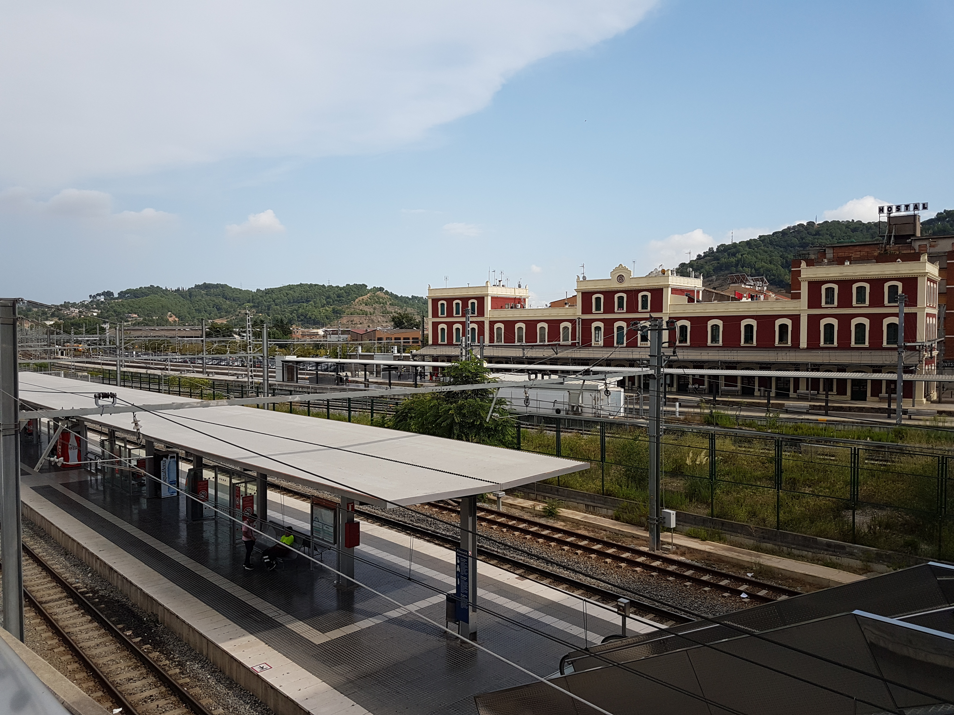 Estació de Martorell Central de la línia Llobregat-Anoia de FGC (en primer plà) i l'estació de Martorell de la línia Barcelona-Vilafranca-Sant Vicenç de Calders de RENFE (al fons)